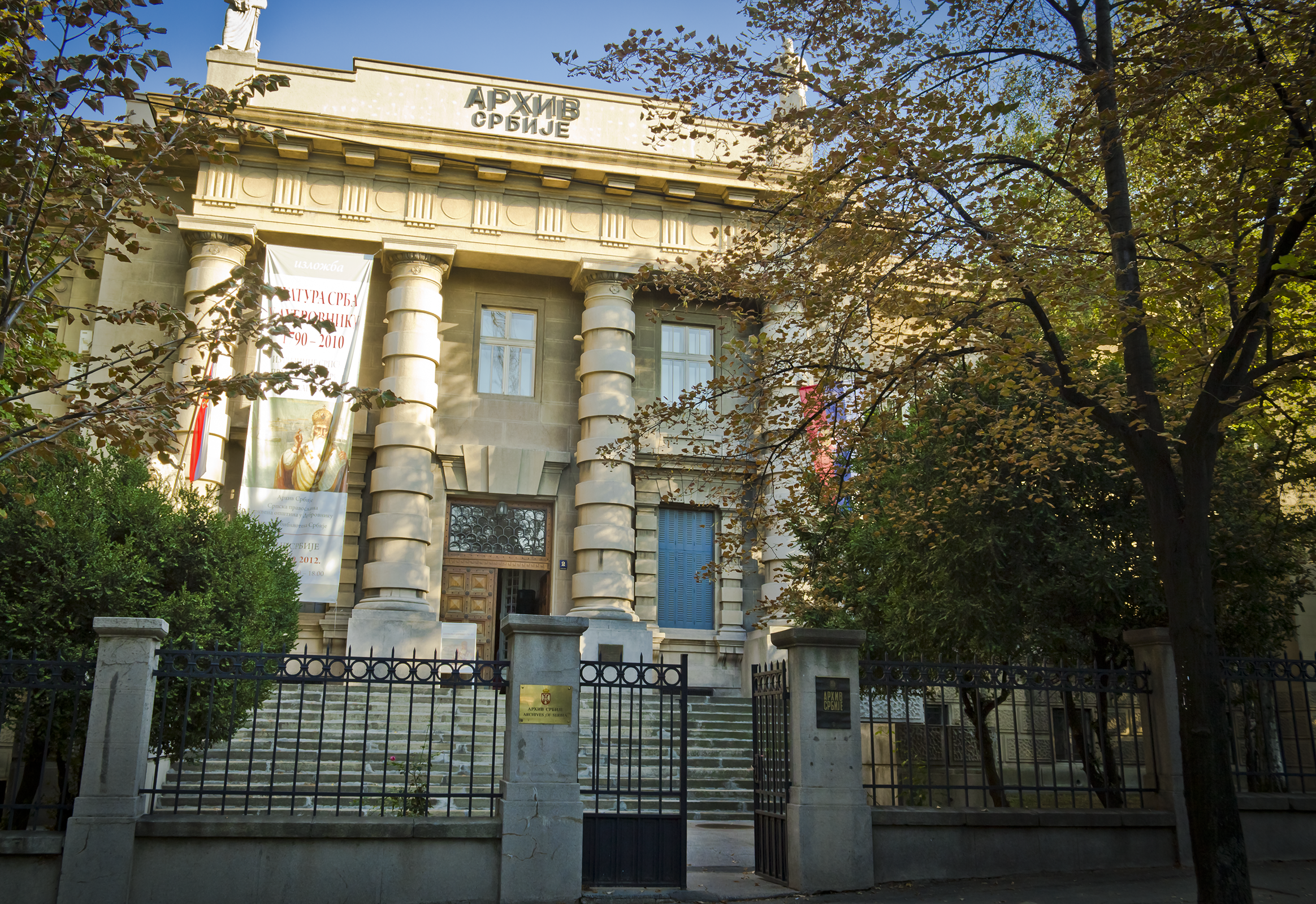 Zgrada Arhiva Srbije, pogled od prekoputa.